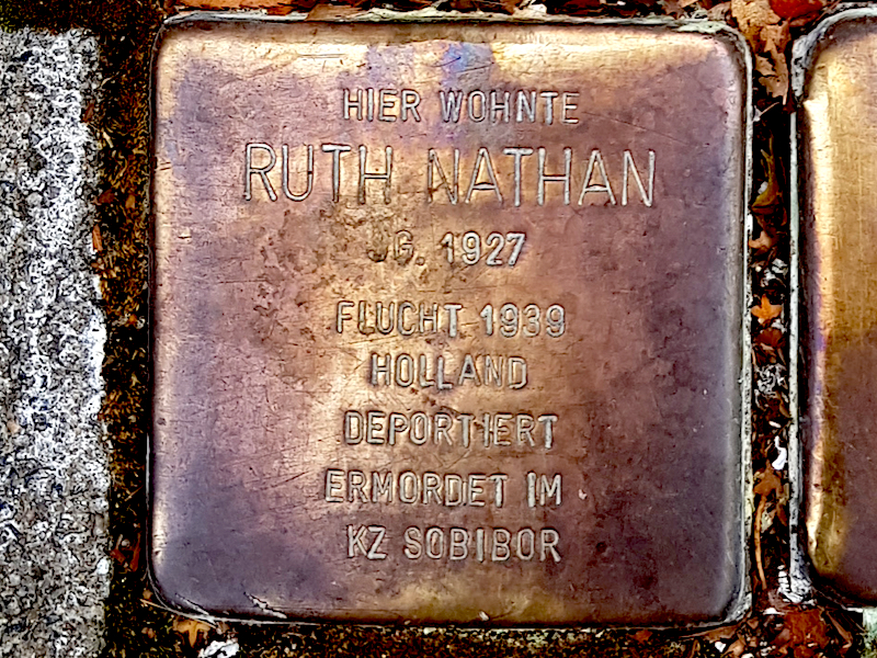 Stolperstein für Ruth Nathan, Lerchenstr. 25, Duisburg-Neudorf